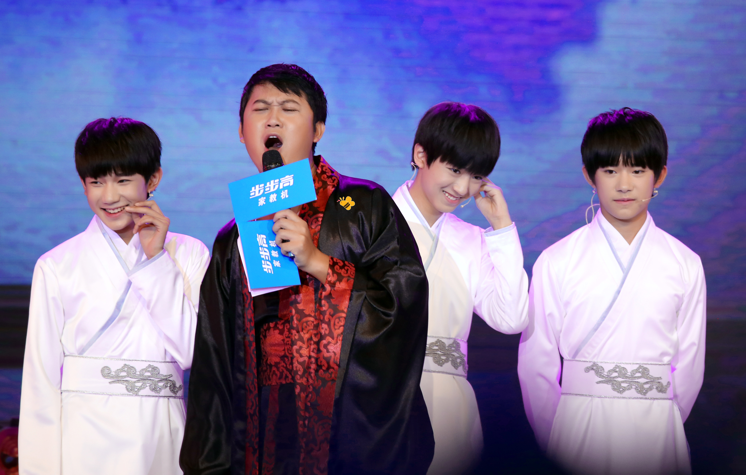 TFBOYS